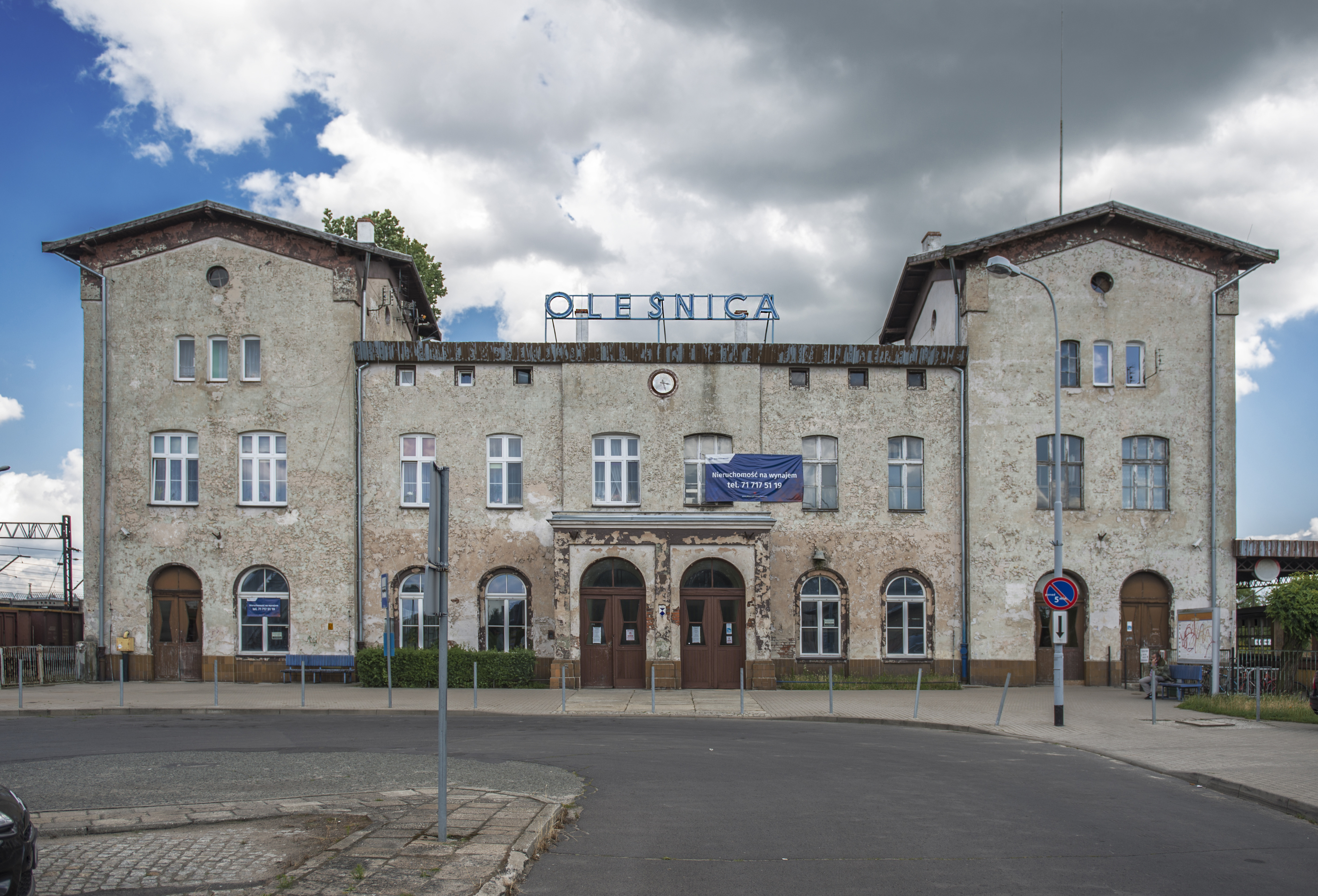 Dworzec Kolejowy